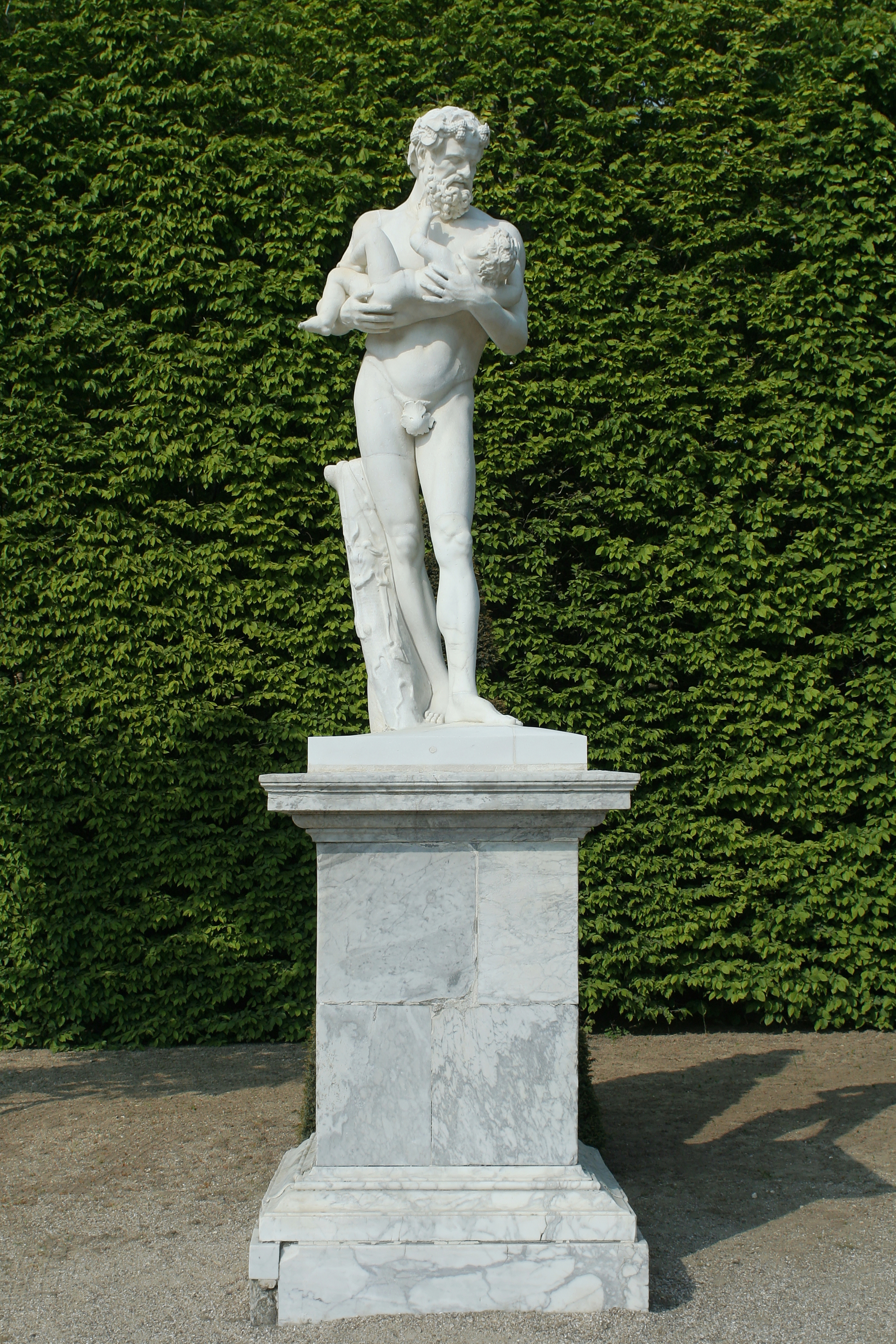 Parc de Versailles, demi-lune du bassin du Char-d'Apollon. Silène portant le jeune Bacchus, antique installé en 1795 (était auparavant à Marly).